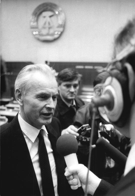 ADN-ZB Reiche 13.11.1989 Berlin: VK-Tagung Die 11. Tagung der Volkskammer der DDR fand im Plenarsaal des Palastes der Republik statt. Nach seiner Wahl zum Vorsitzenden des Ministerrates der DDR stellte sich Hans Modrow von der SED-Fraktion den Fragen der Journalisten.